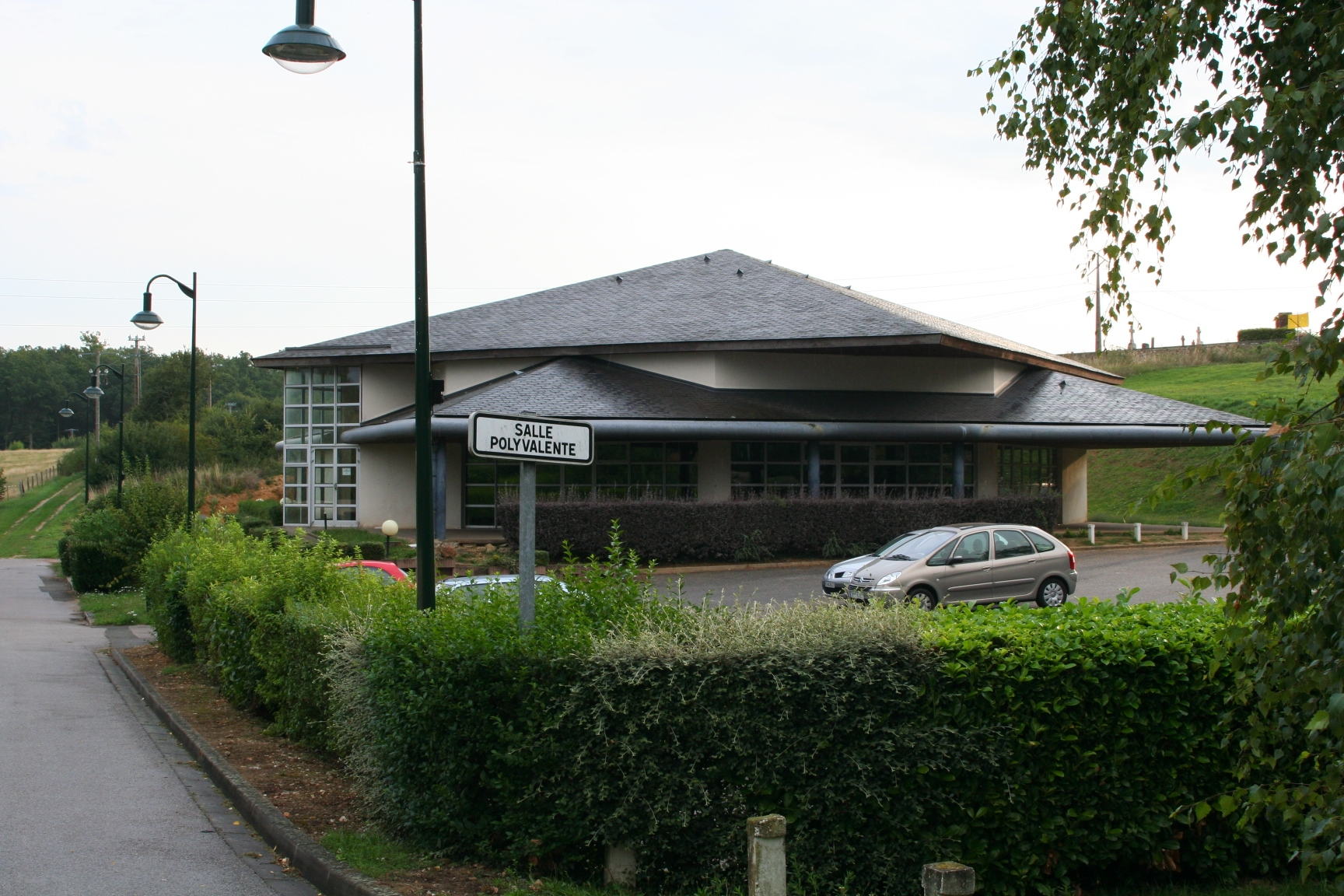 Salle polyvalente à La Chapelle-Réanville - Eure (France)